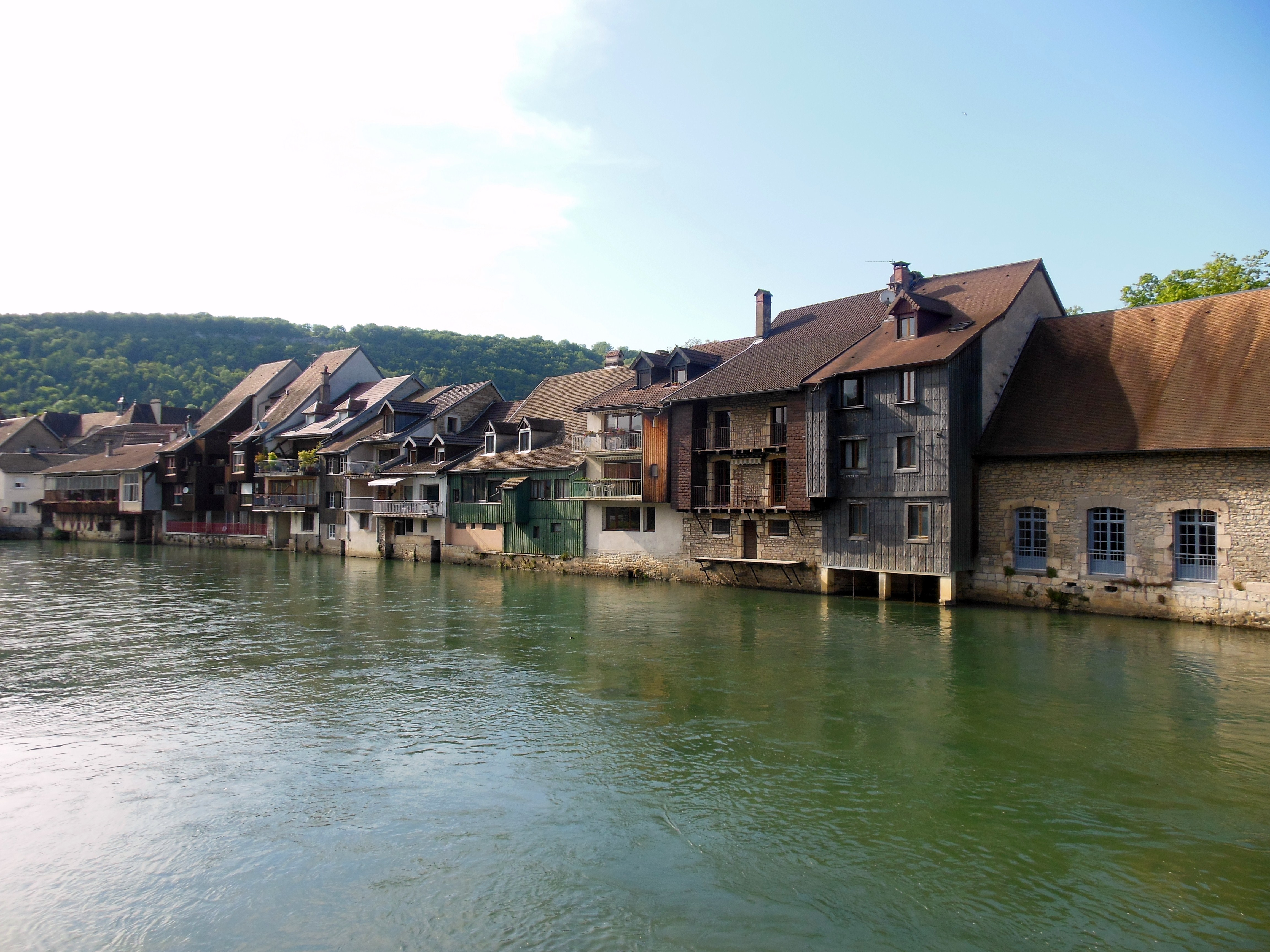 Vue des maisons de la Place Courbet, depuis le pont sur la Loue, à Ornans.